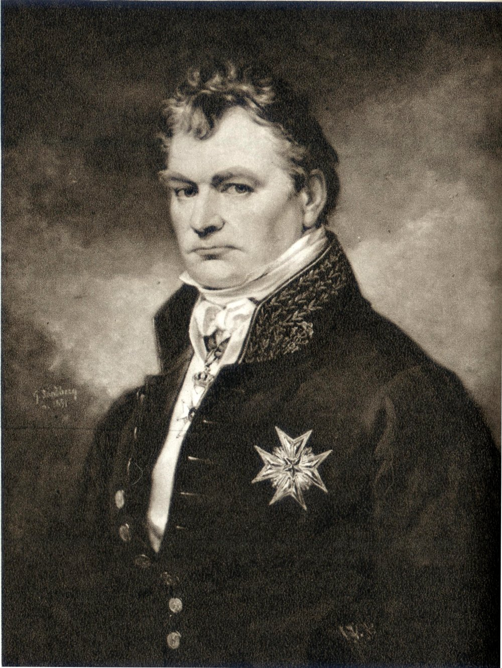 Gabriel Poppius (1769-1856), justitieråd, president i Kommerskollegium, statsråd. Oljemålning av Johan Gustaf Sandberg 1831.